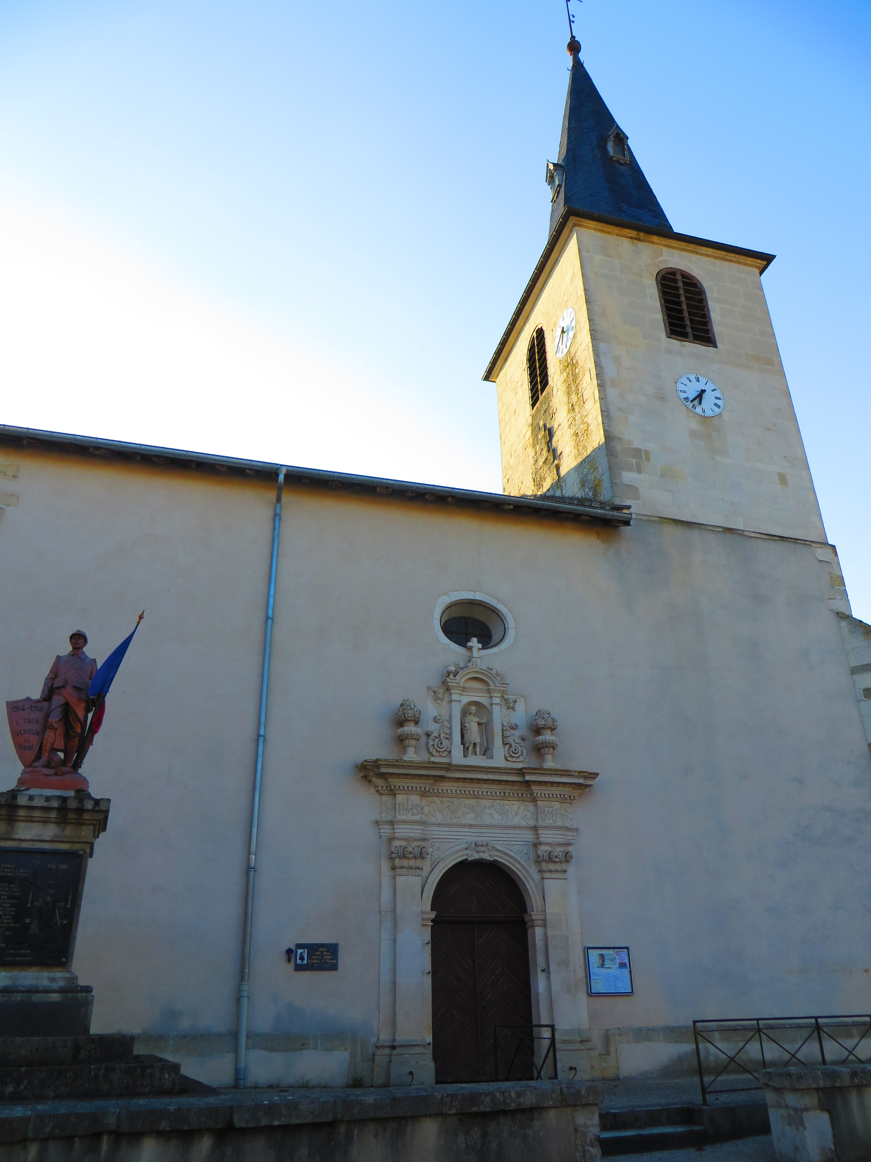 Greux Église Saint-Maurice